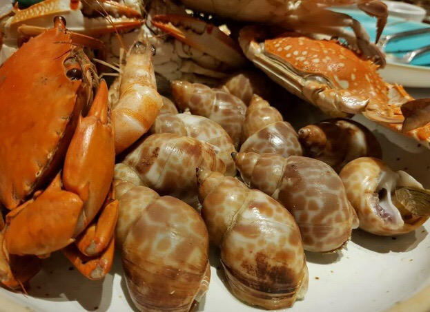 Diacuaochaisan